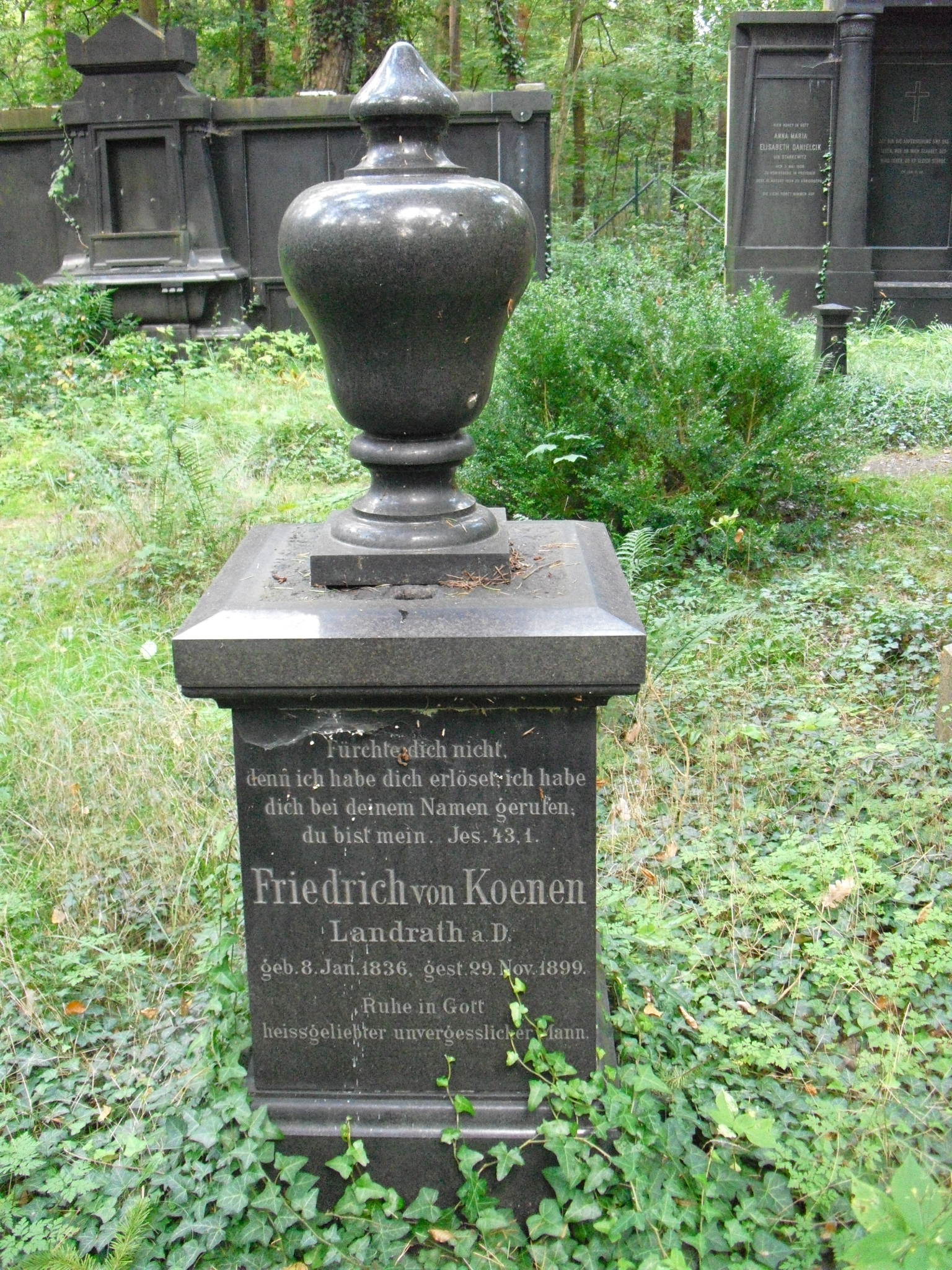 Grabstein für Friedrich von Koenen, Landrath a. D., auf dem Südwestkirchhof Stahnsdorf. (Fürchte dich nicht, denn ich habe dich erlöst. Ich habe dich bei deinem Namen gerufen; du bist mein! (Jesaja, 43, 1)